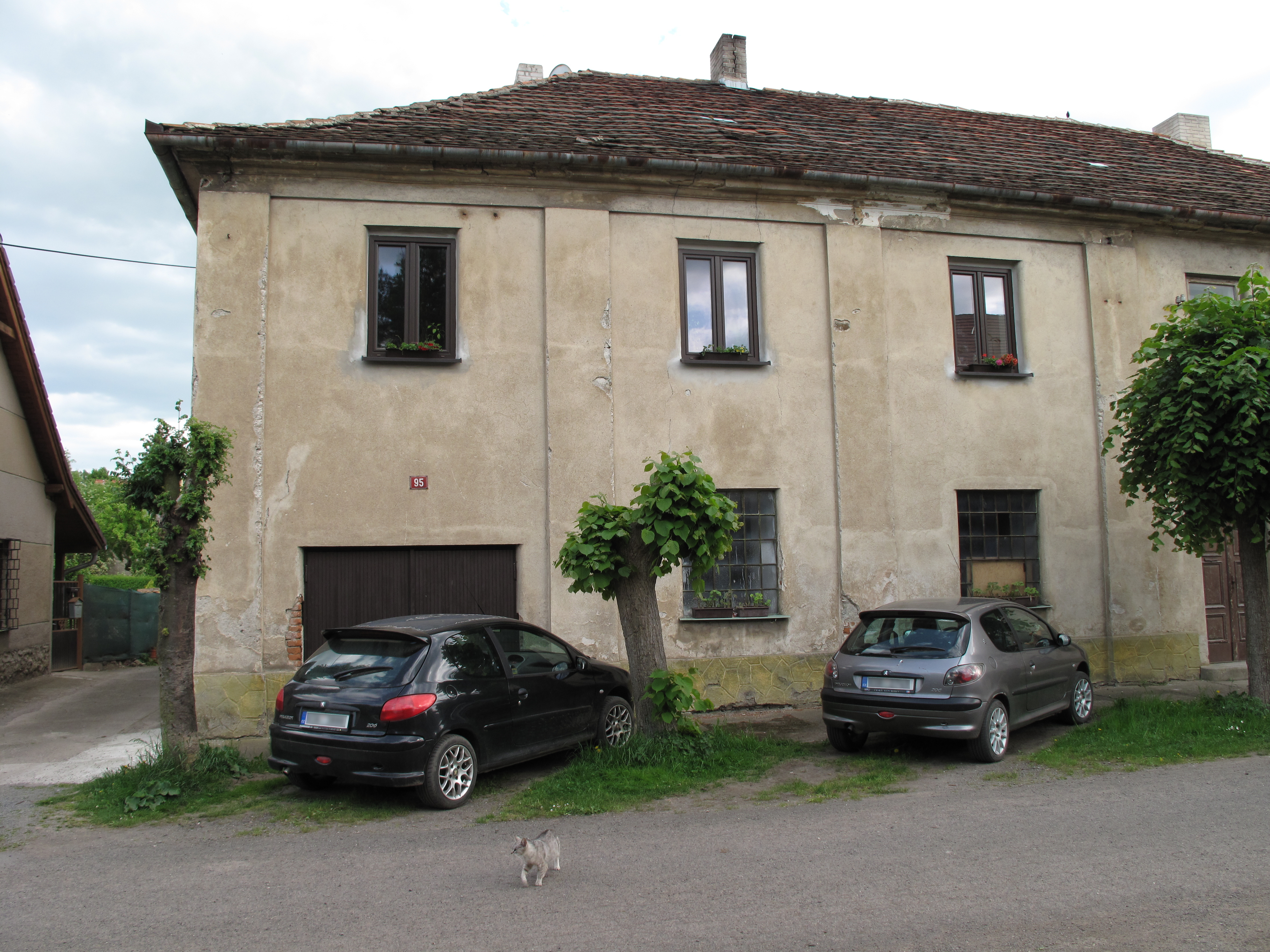 Fasáda bývalé synagogy v Lochovicích. Okres Beroun, Česká republika.